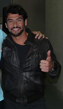 con el gran actor Gabriel Porras